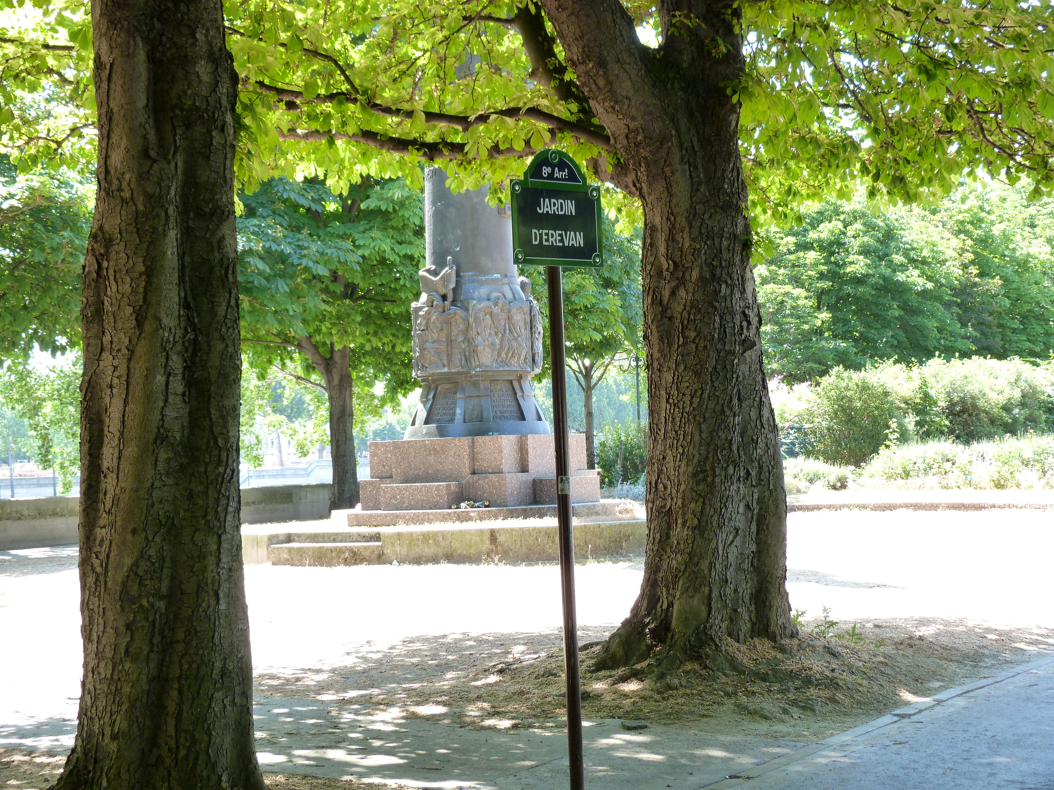 Cours Albert-Ier (Paris, 8e arrond.) - Espace planté le long de la Seine (Jardin d'Erevan) avec le monument Mickiewicz par Antoine Bourdelle.